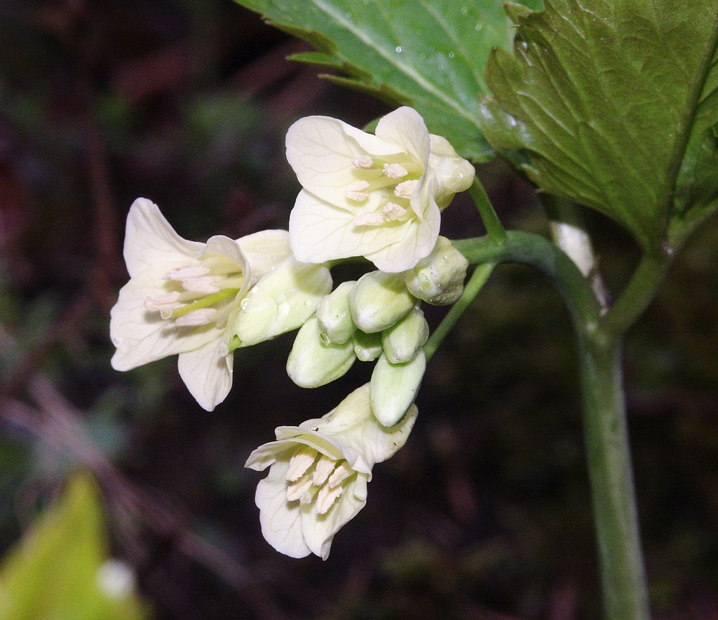 Cardamine enneaphyllos, Schwäbisch-Fränkische Waldberge, Germany